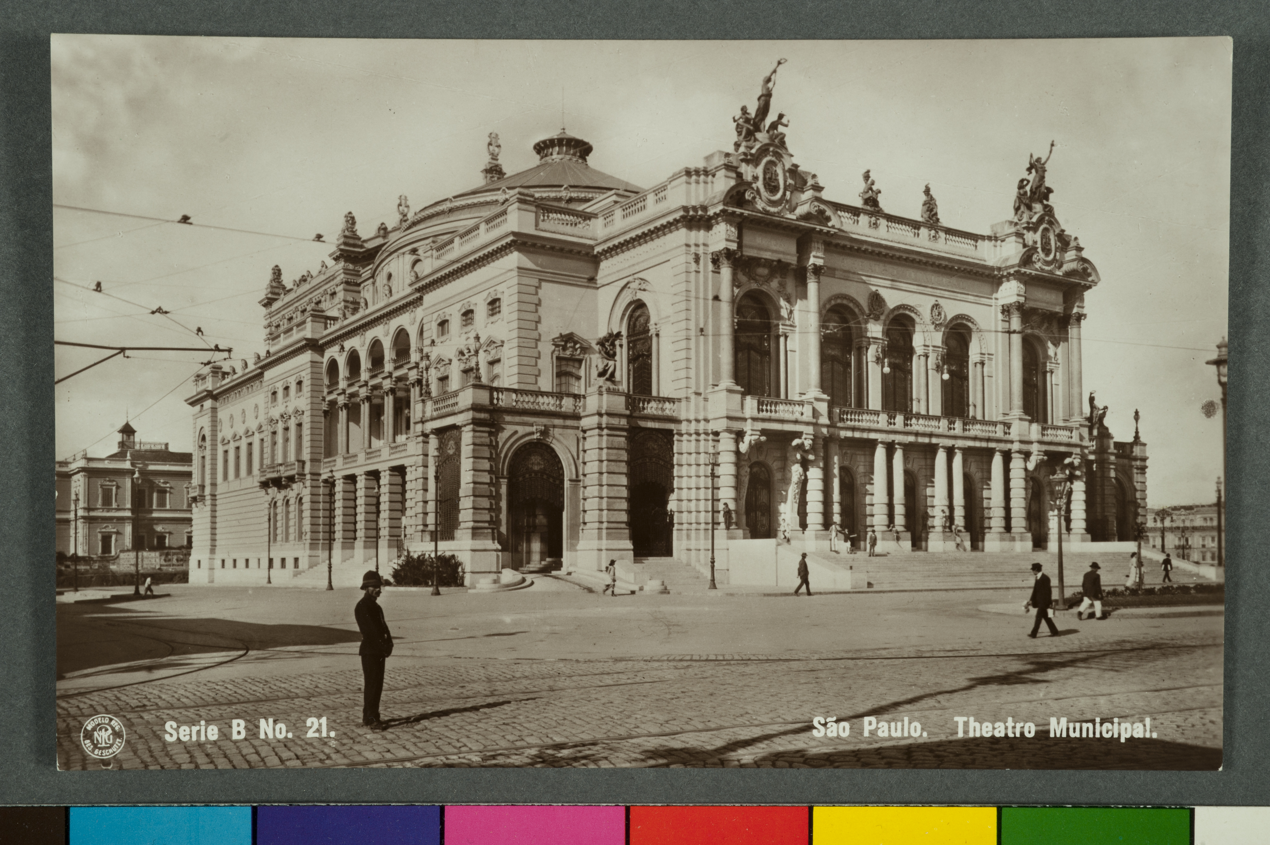 Obra que integra o acervo do Museu Paulista da USP.